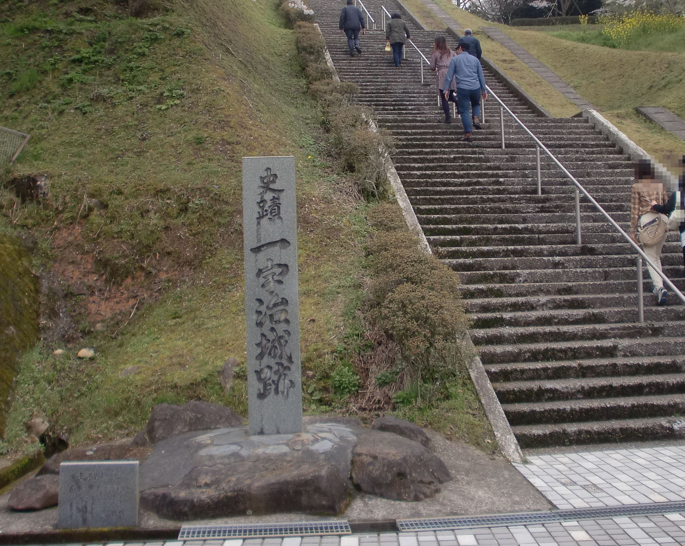 一宇治城（鹿児島県日置市）の入口